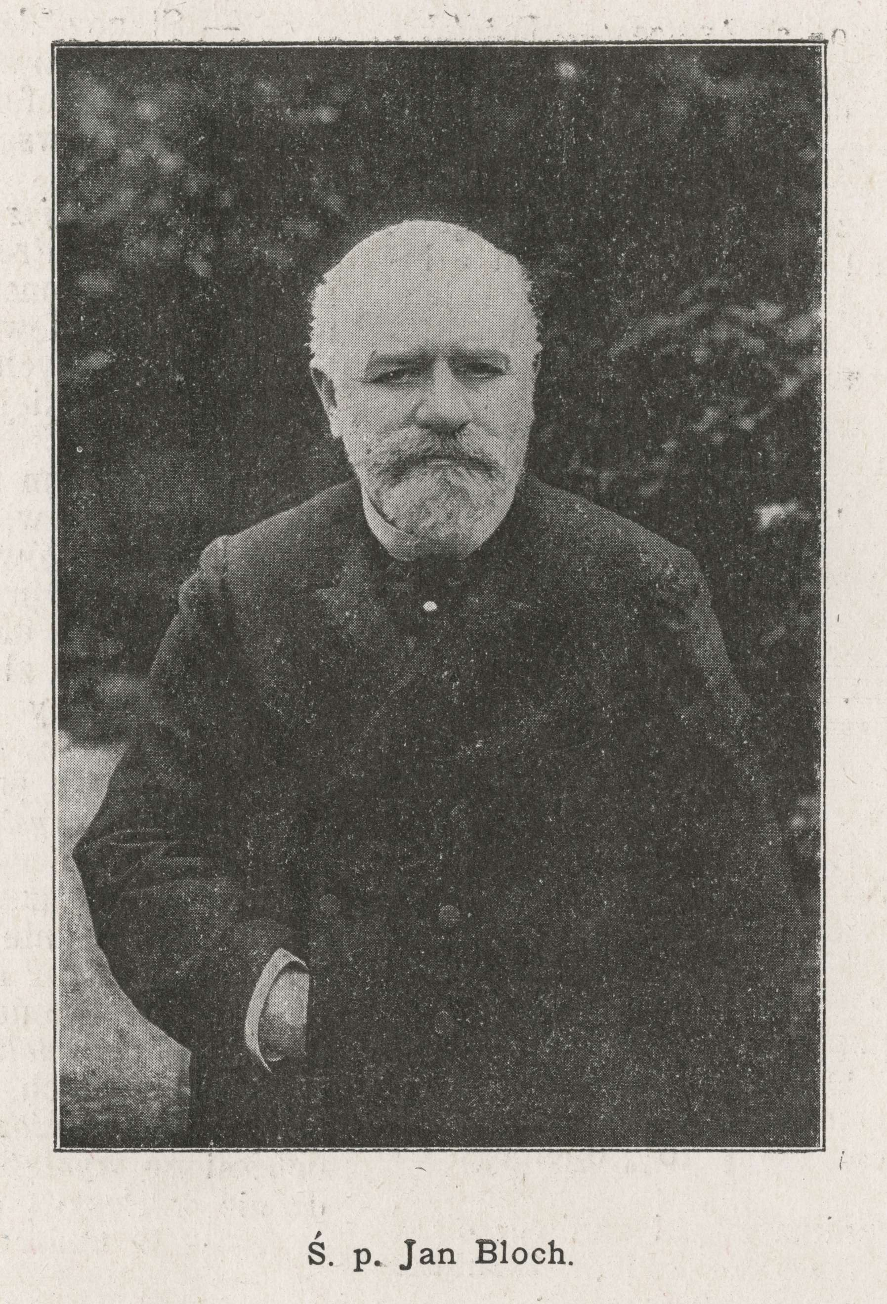 Ś. p. Jan Bloch